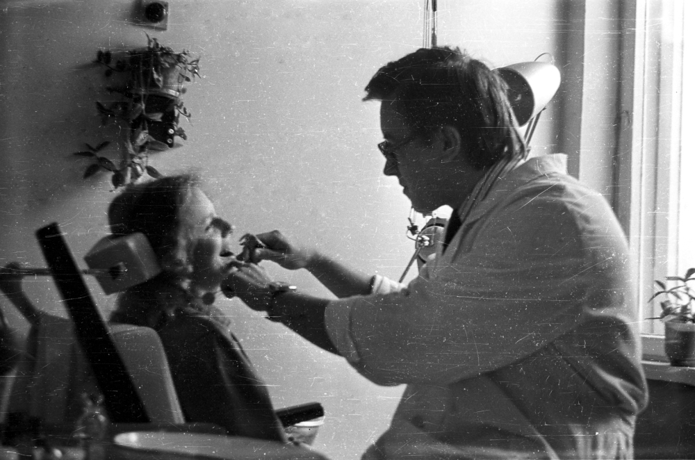 Н. И. Ветлицкая в 856 школе. Москва, 1980. Постановочное фото во время лабораторной работы по теме "фотографирование" по физике